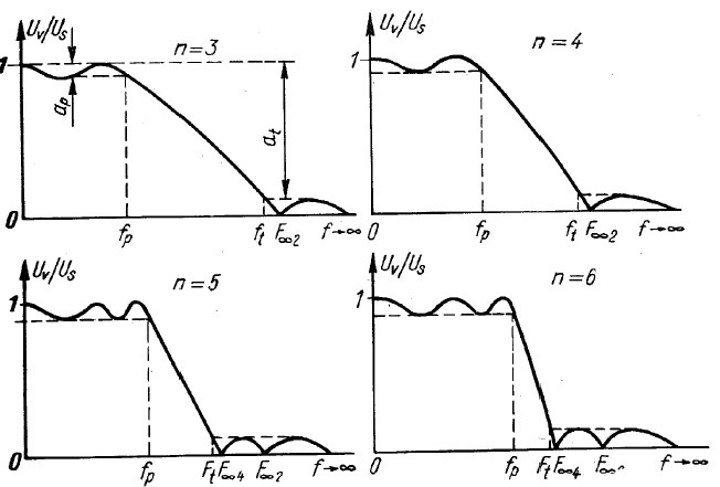 Caueri filtri tunnusjooned sõltuvalt filtri järgust n